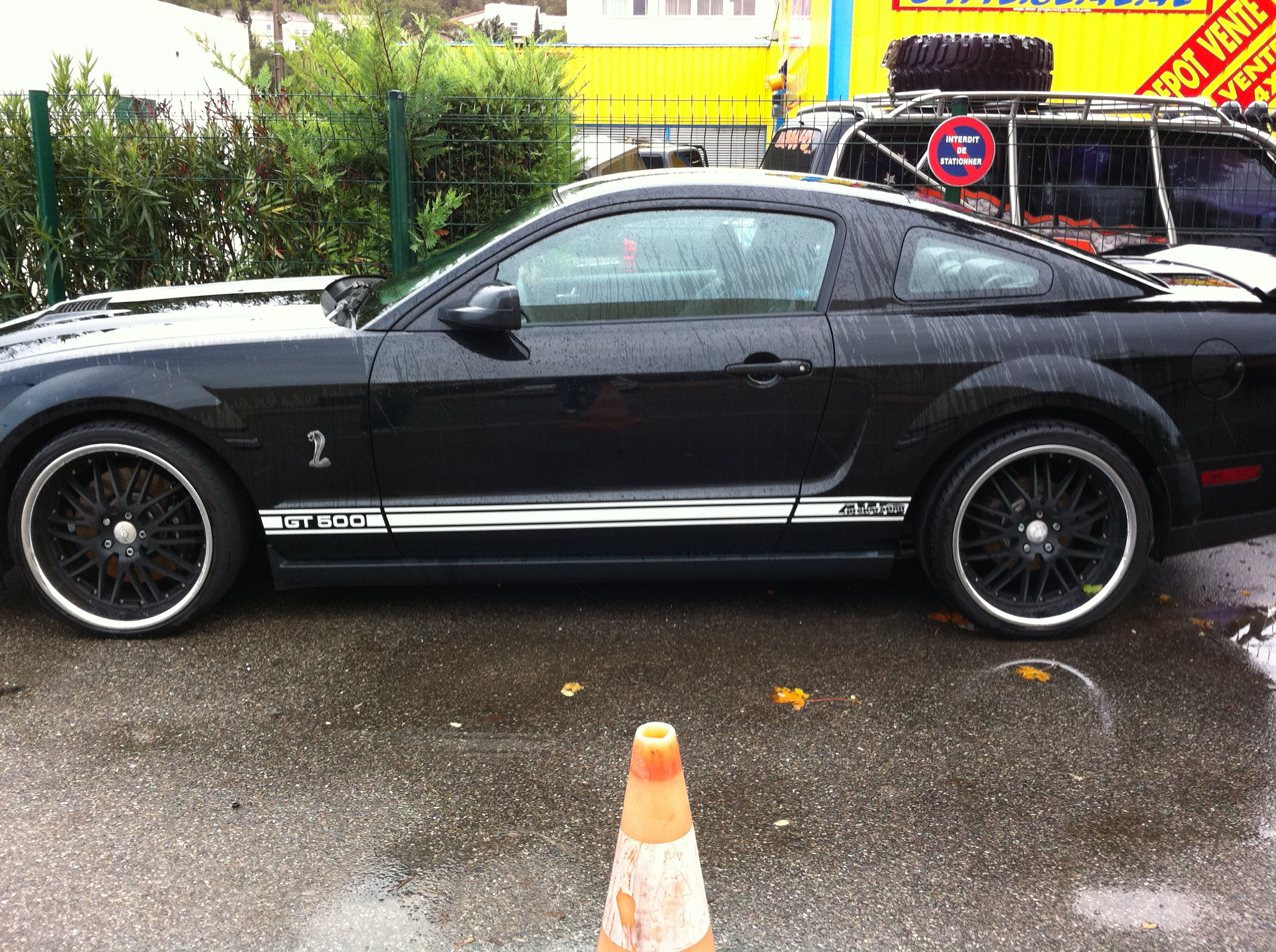 shelby